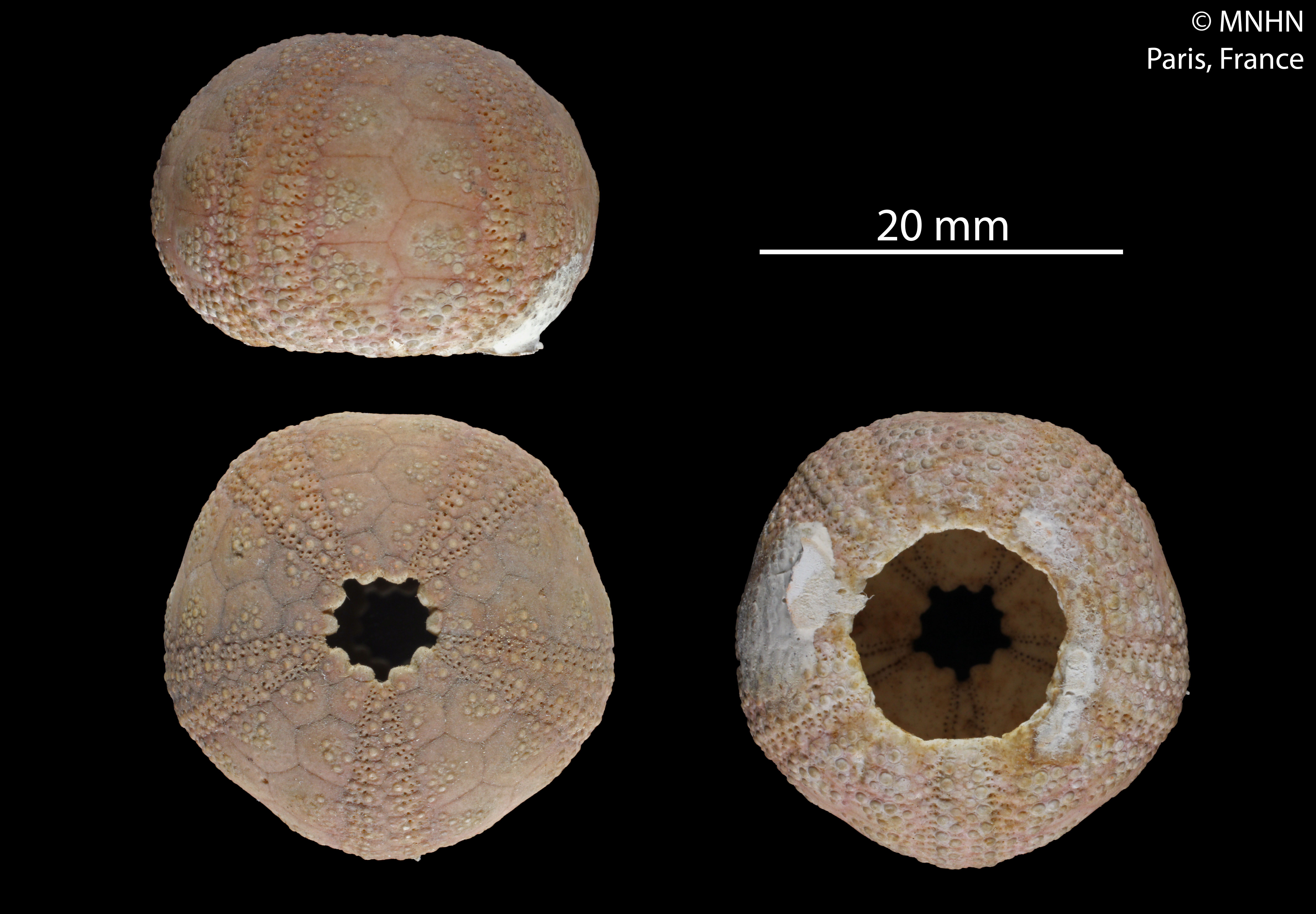 Microcyphus maculatusSpécimen MNHN-IE-2013-10433Collection : Échinodermes (IE)Muséum National d'Histoire Naturelle (Paris, France)